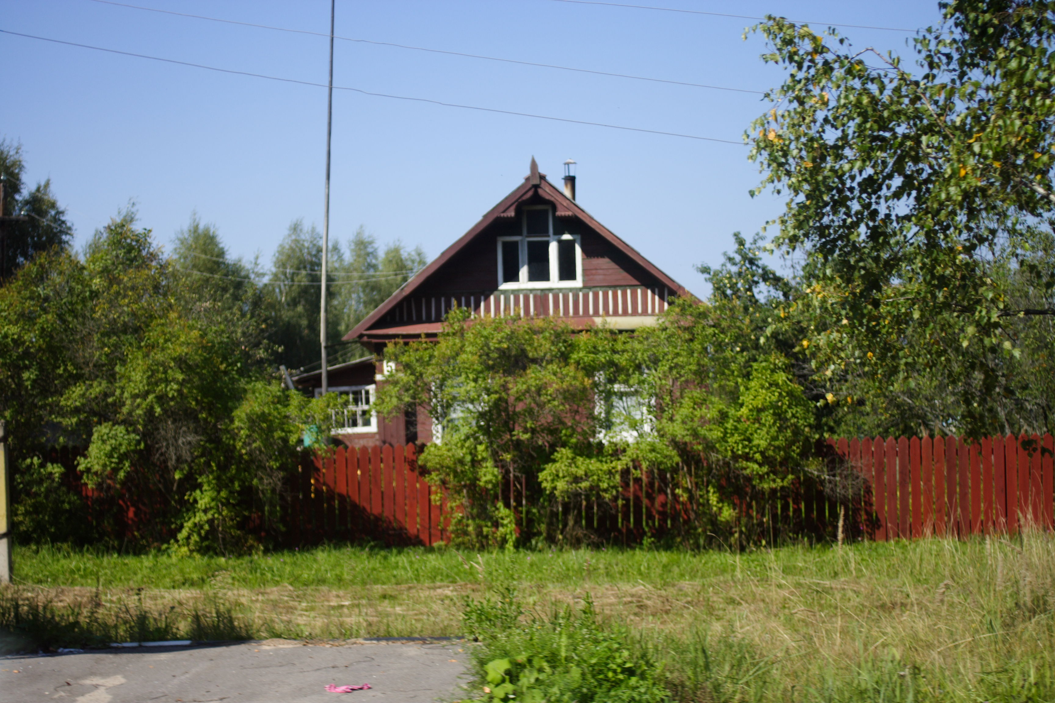 Дом в Козлово